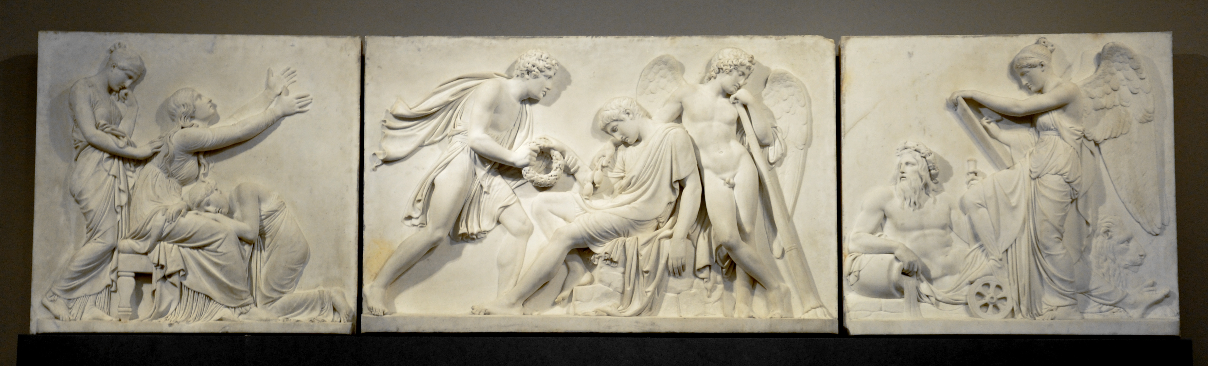 Bertel Thorvaldsen: Epitaph für Johann Philipp Bethmann-Hollweg; Rom, 1813–1832; Marmor; 91 cm; Liebieghaus, Frankfurt am Main, Inv. Nr. 2534 a–c. Weblink